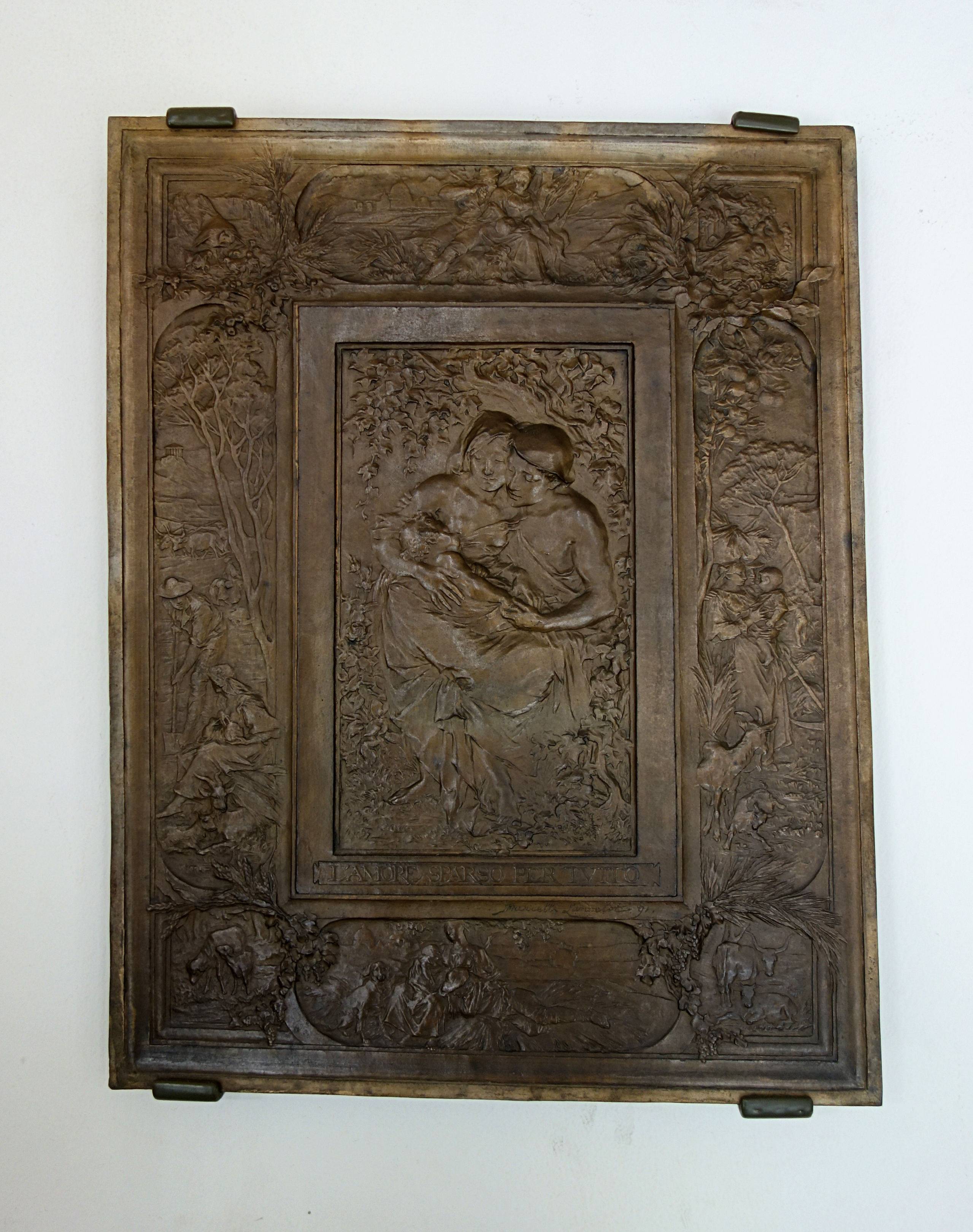 Amore sparso per tutto ou La Famille, de Marcelle-Renée Lancelot-Croce, au palais des beaux-arts de Lille.